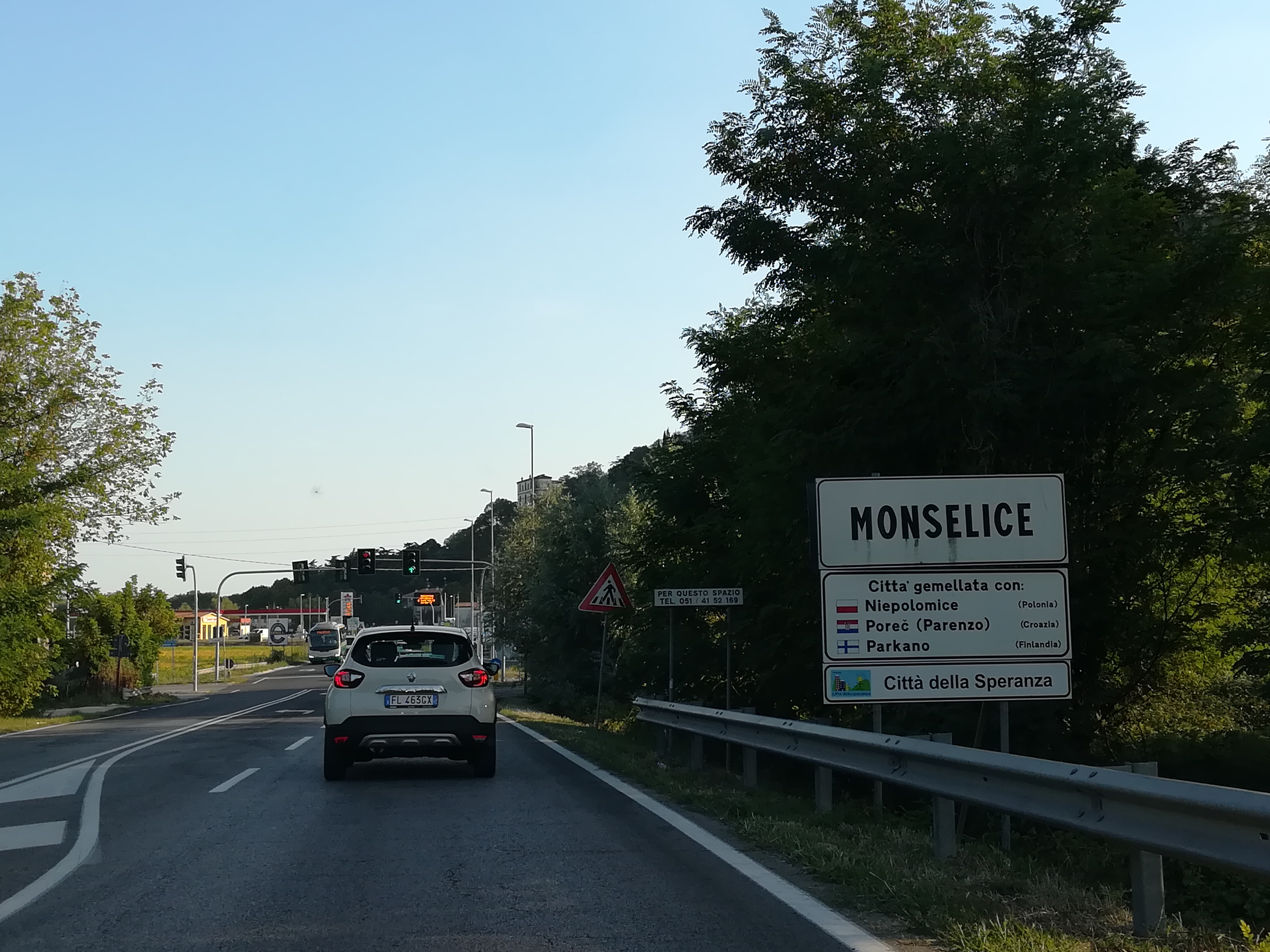 Monselice